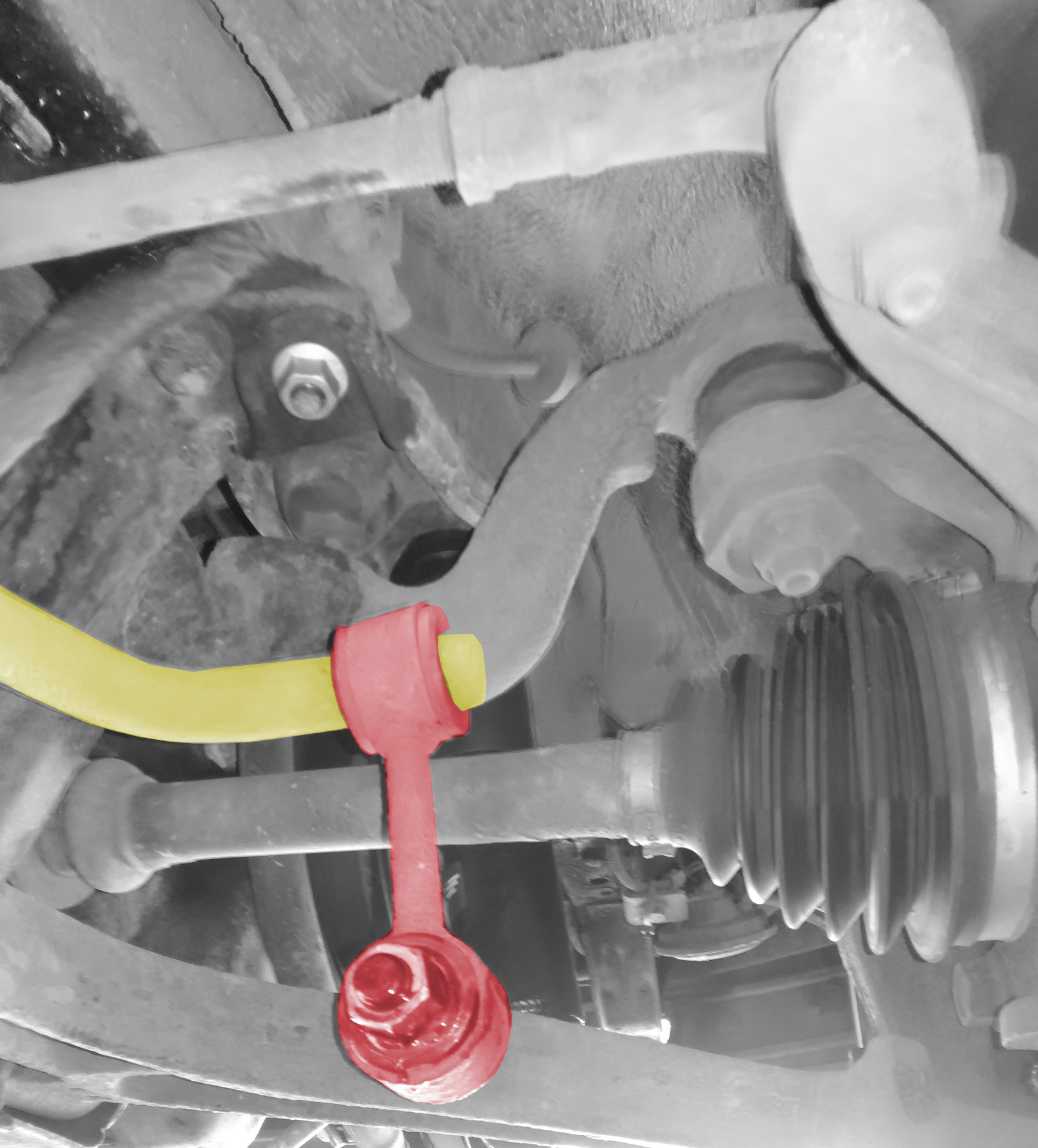 Stabilisatorkoppelstange mit Gummidämpfer VW T4